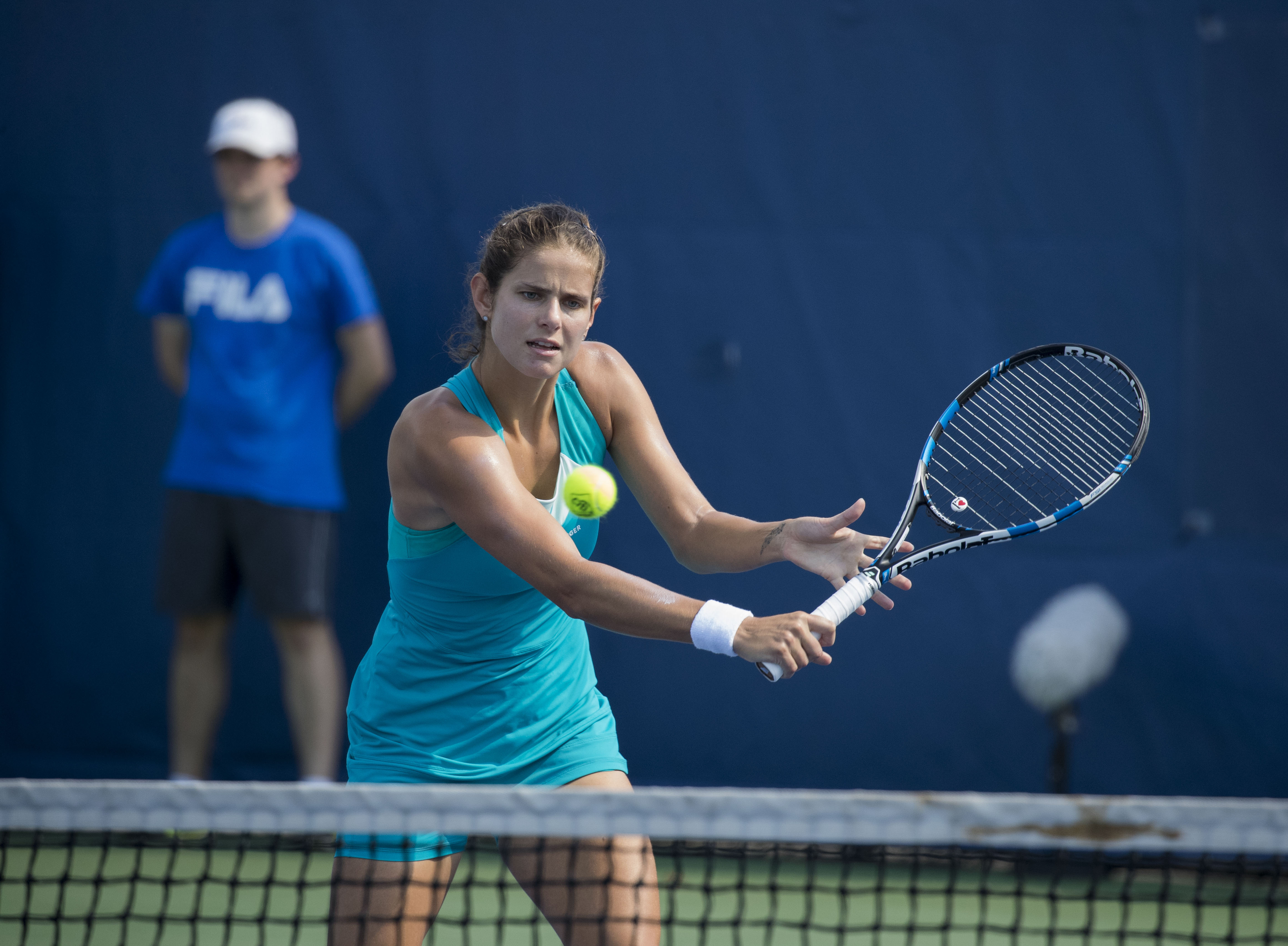 Citi Open Tennis 2017